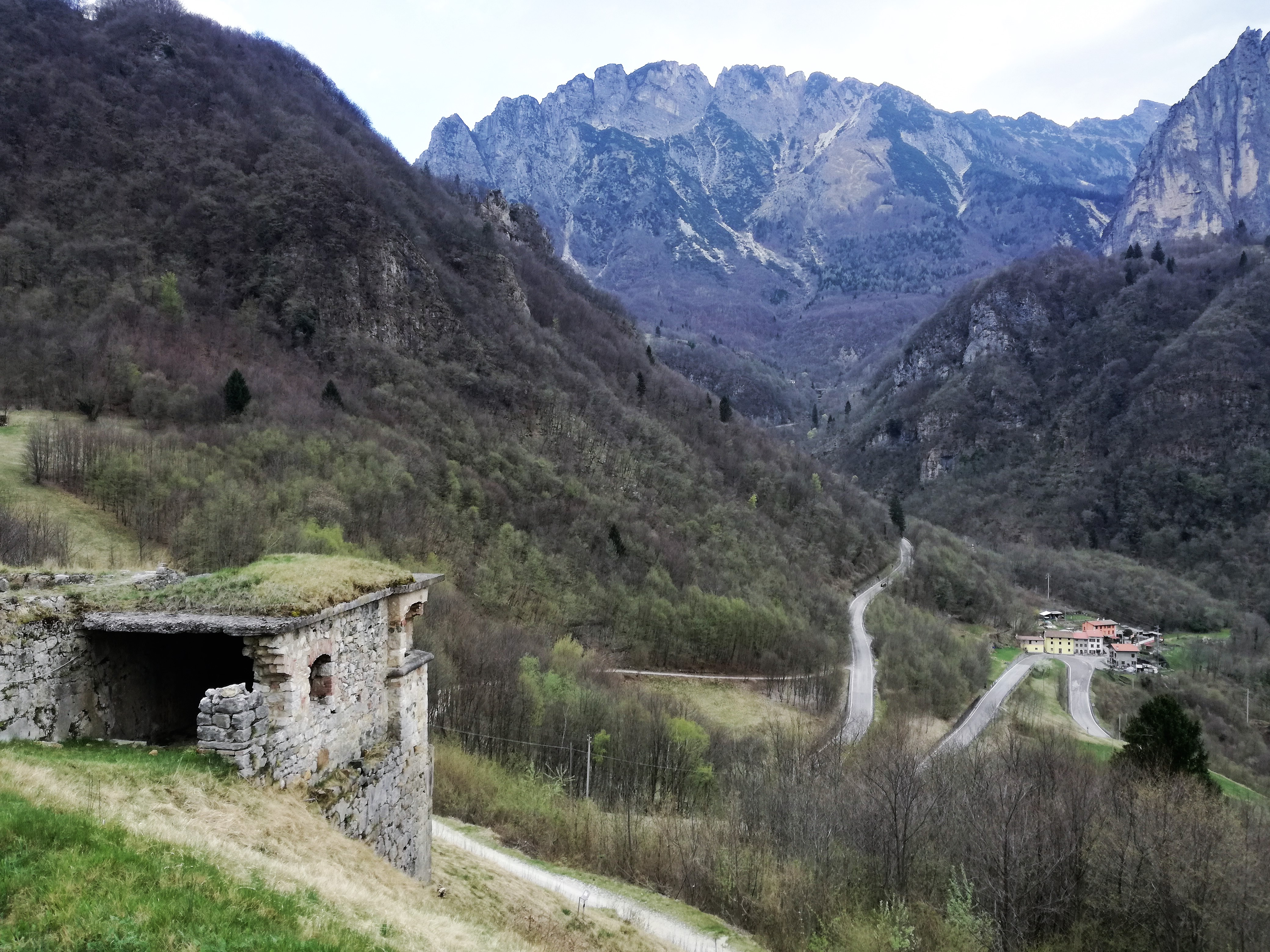 Forte Monte Maso - Beobachtungsstand mit Punta Favella